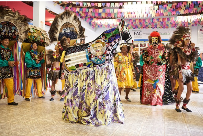 Apresentação de Bumba-Meu-Boi dentro do Centro de Tradições Populares de Sobradinho.